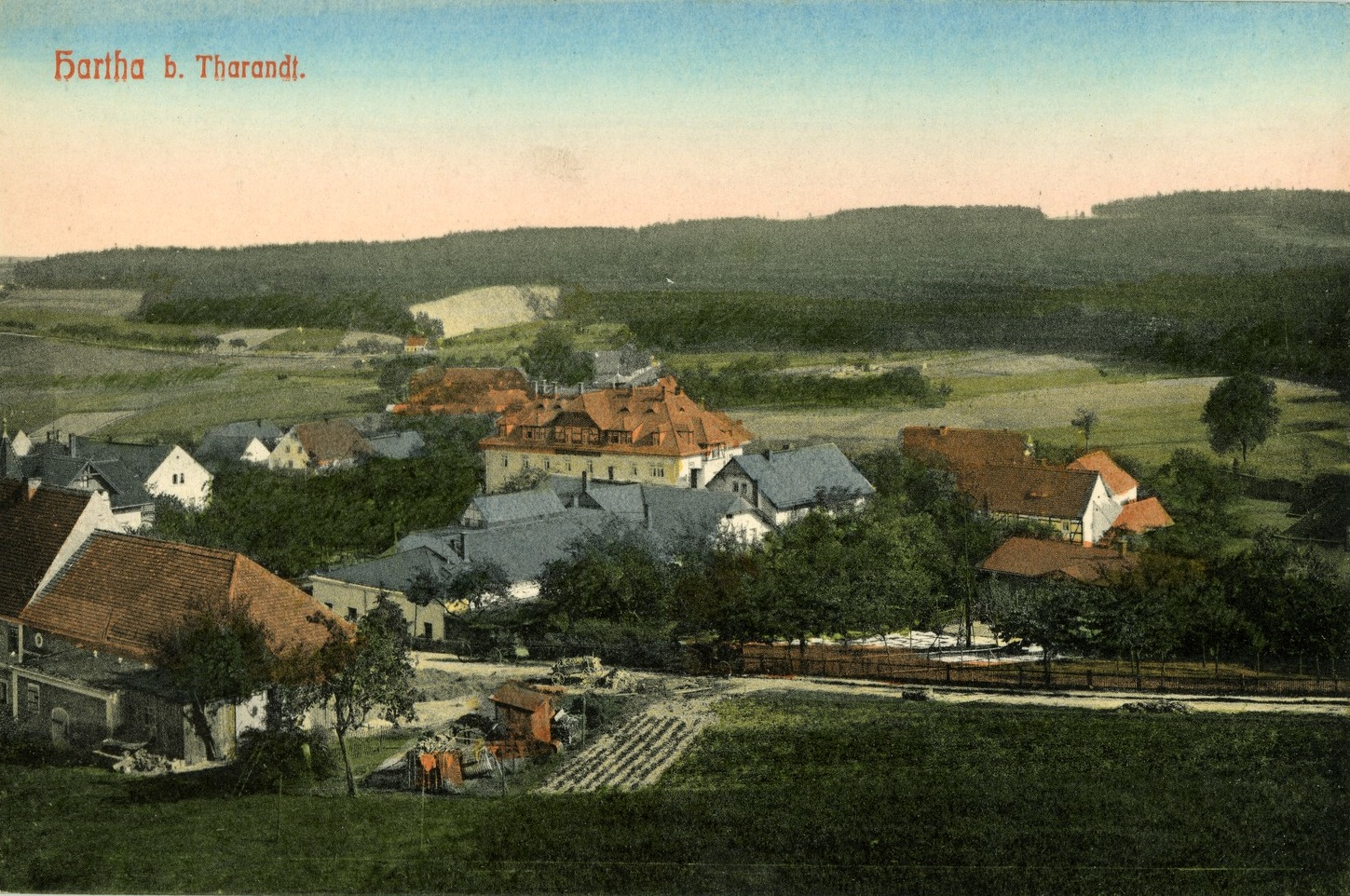 Hartha; Blick über Hartha This postcard is from publisher Brück & Sohn in Meißen ( postcard has a unique number 07510 and is available in a higher resolution at the publisher. This images was uploaded in a cooperation project between Wikipedians and the publisher.